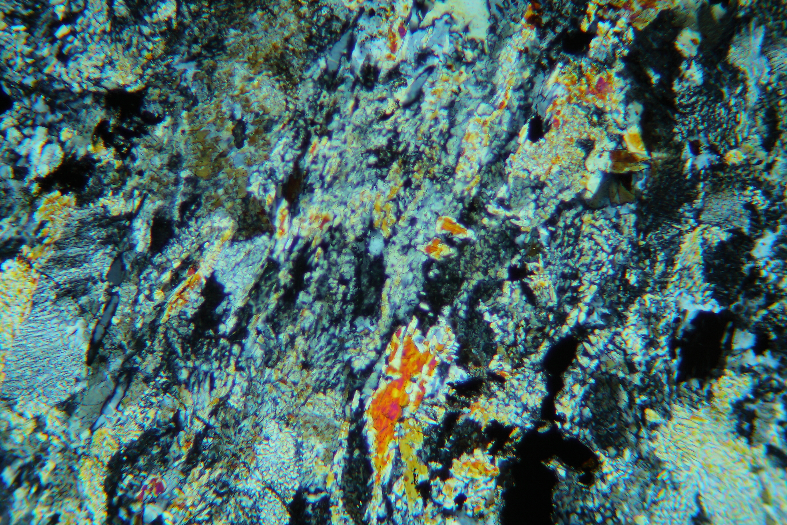 Symplektitische Verwachsungen von Hornblende und Plagioklas in retrograd metamorphisiertem Eklogit (Dünnschliff, XPL)